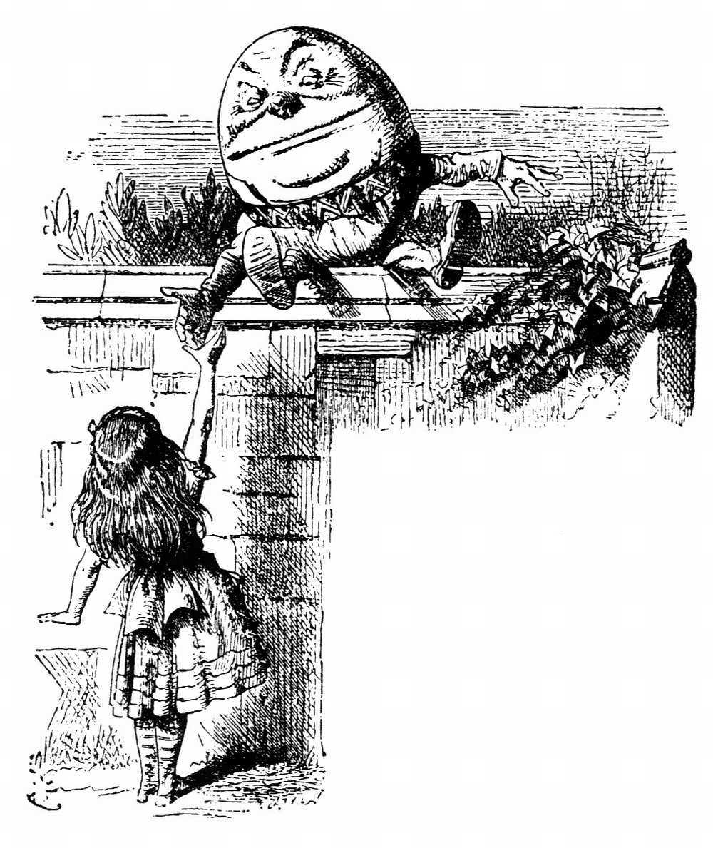 гравюра Джона Тенниела